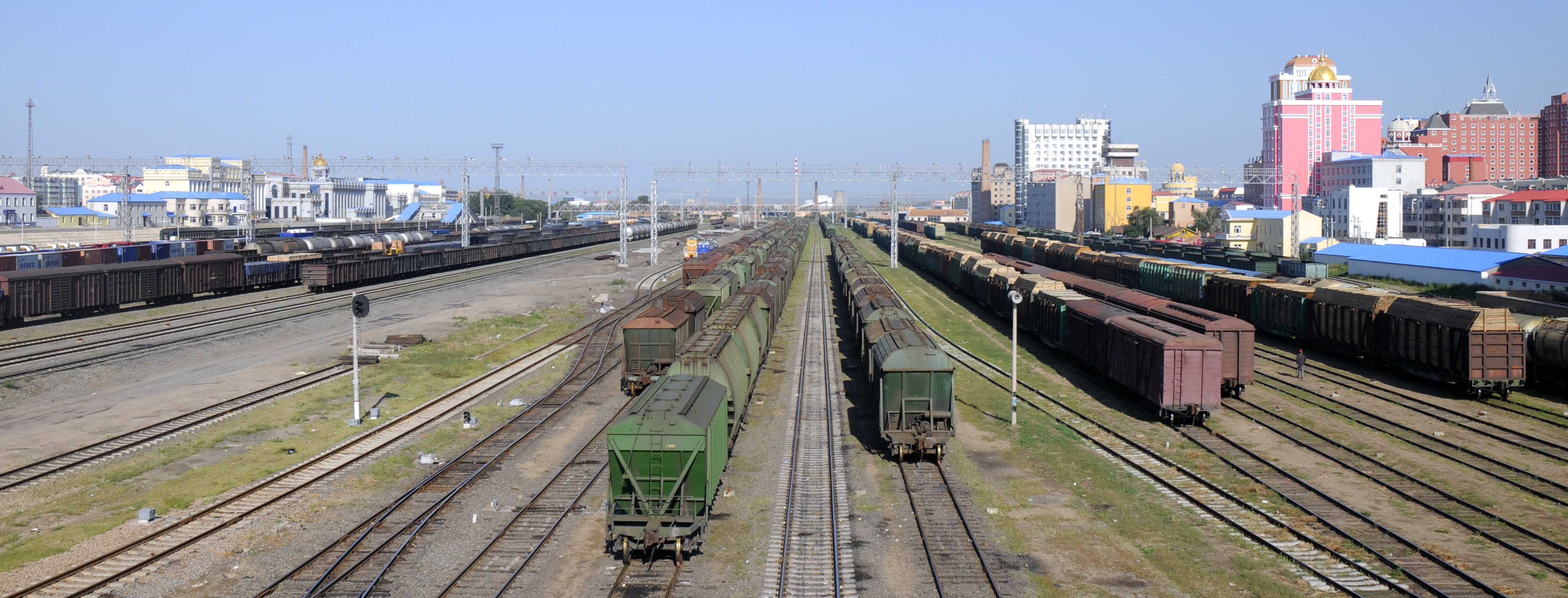 满洲里铁路站场